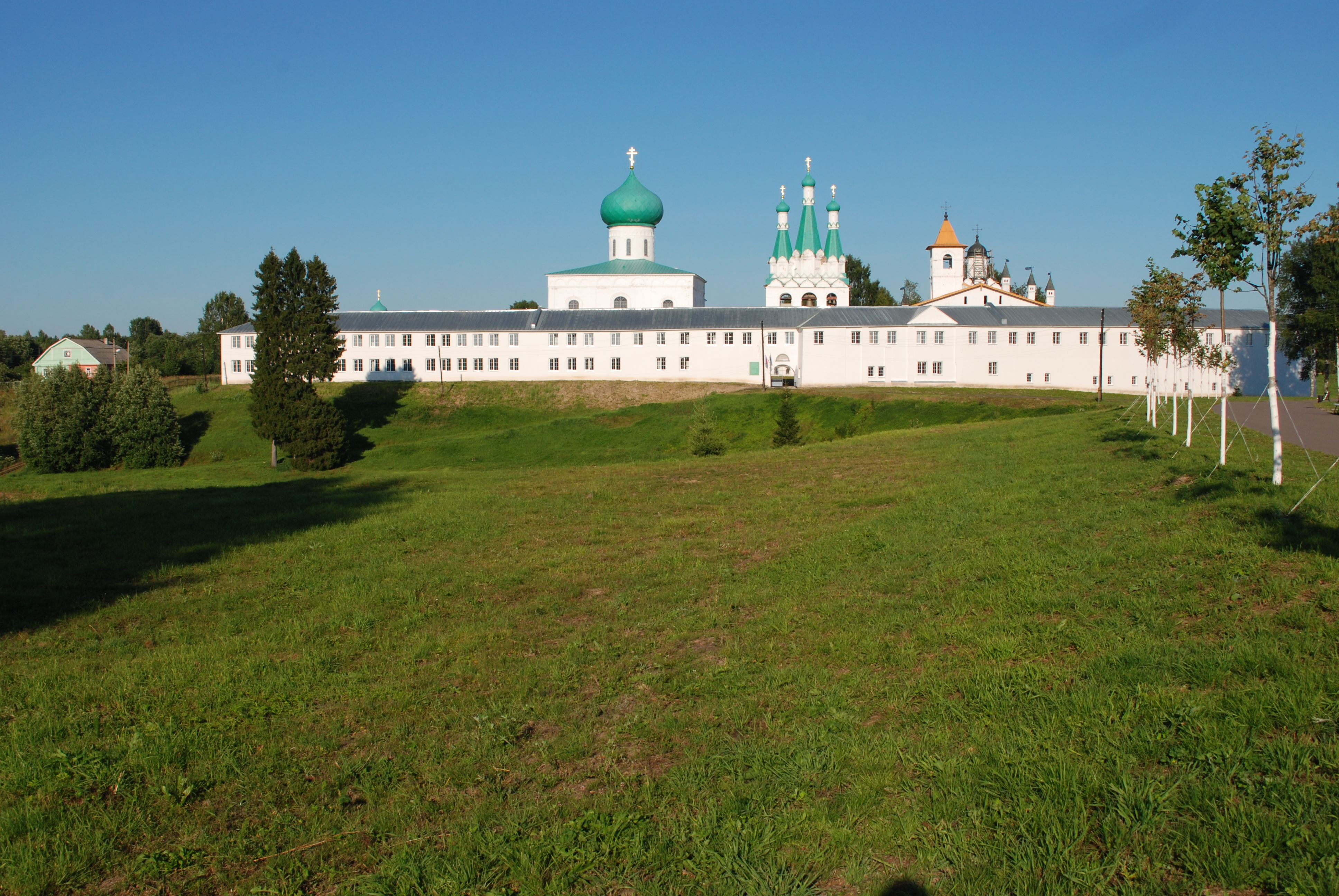 (Лен.область, Лодейное Поле, деревня Старая Слобода)